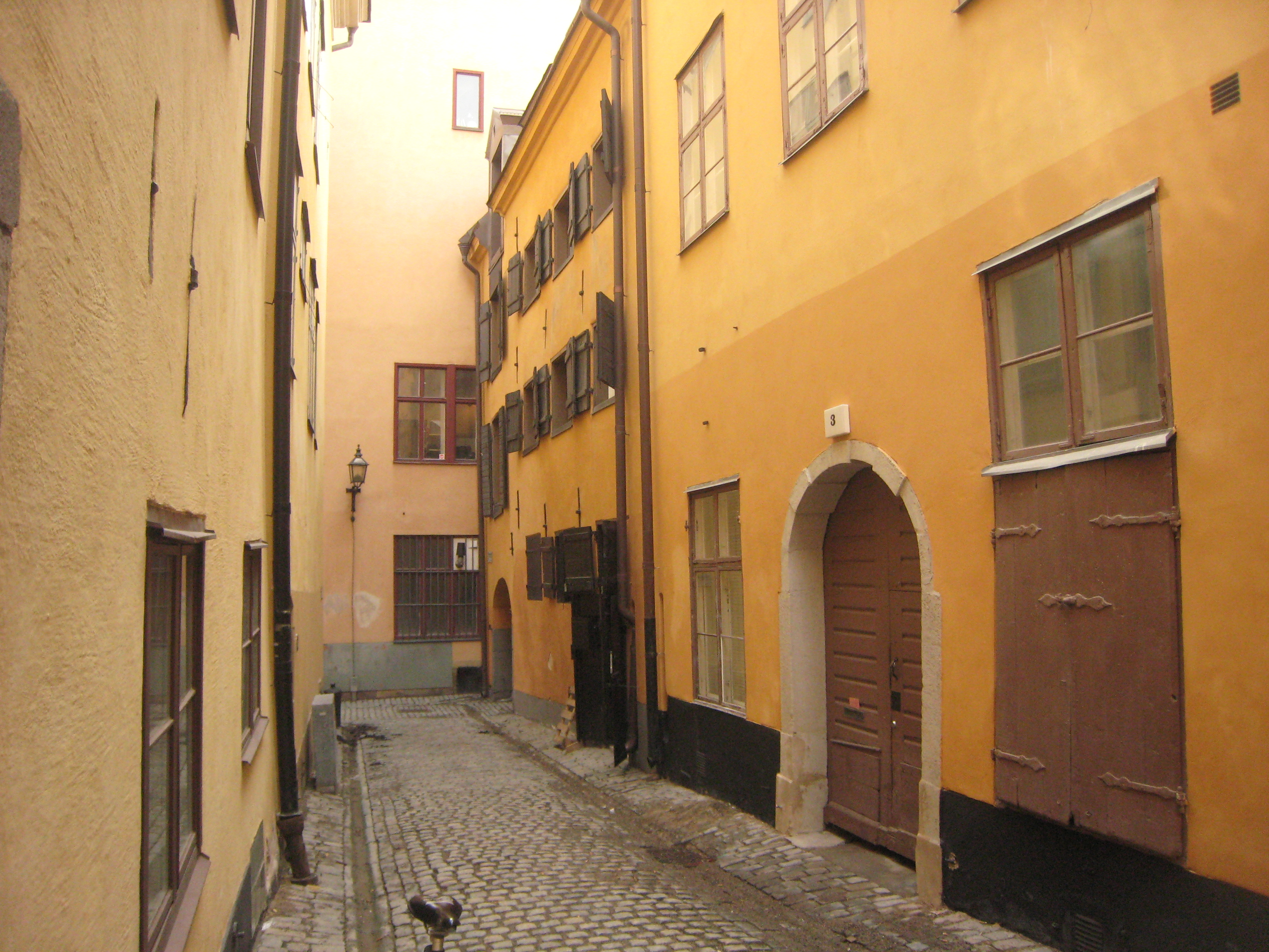 Fastigheten Glaucus 5, sett från Pelikansgränd.